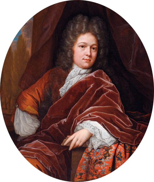 Adriaan van Bredehoff (1672-1733)